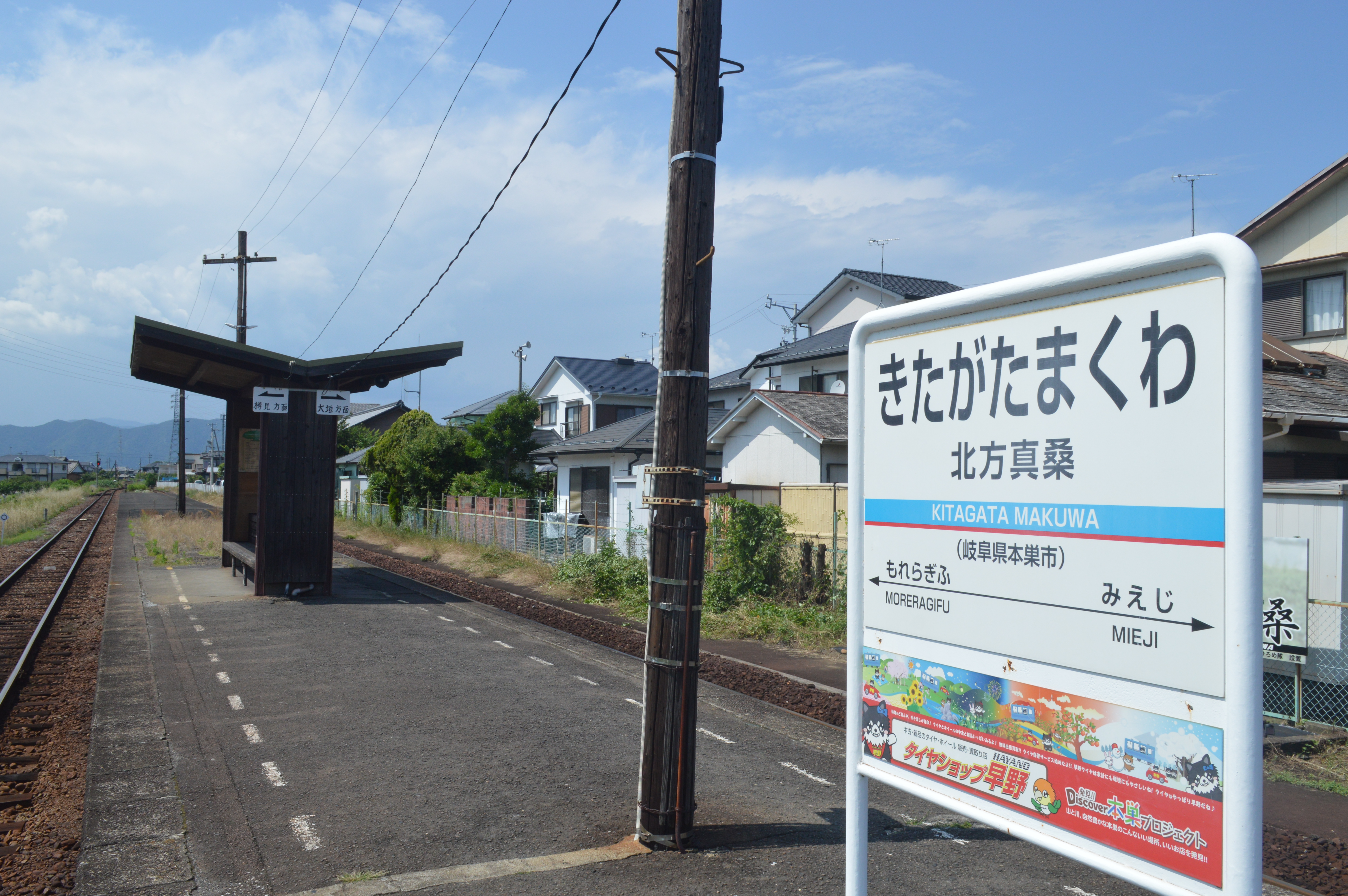 岐阜県本巣市にある樽見鉄道樽見線北方真桑駅。ホーム。